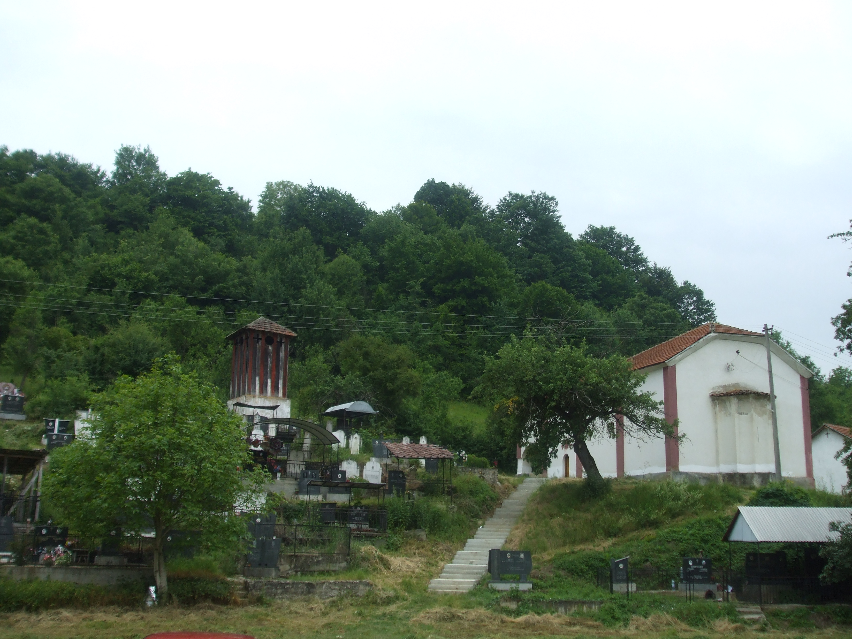 Црква и део гробља у Големом Селу. Снимак са источне стране, са пута за Грнчарицу. Снимио Драгољуб.